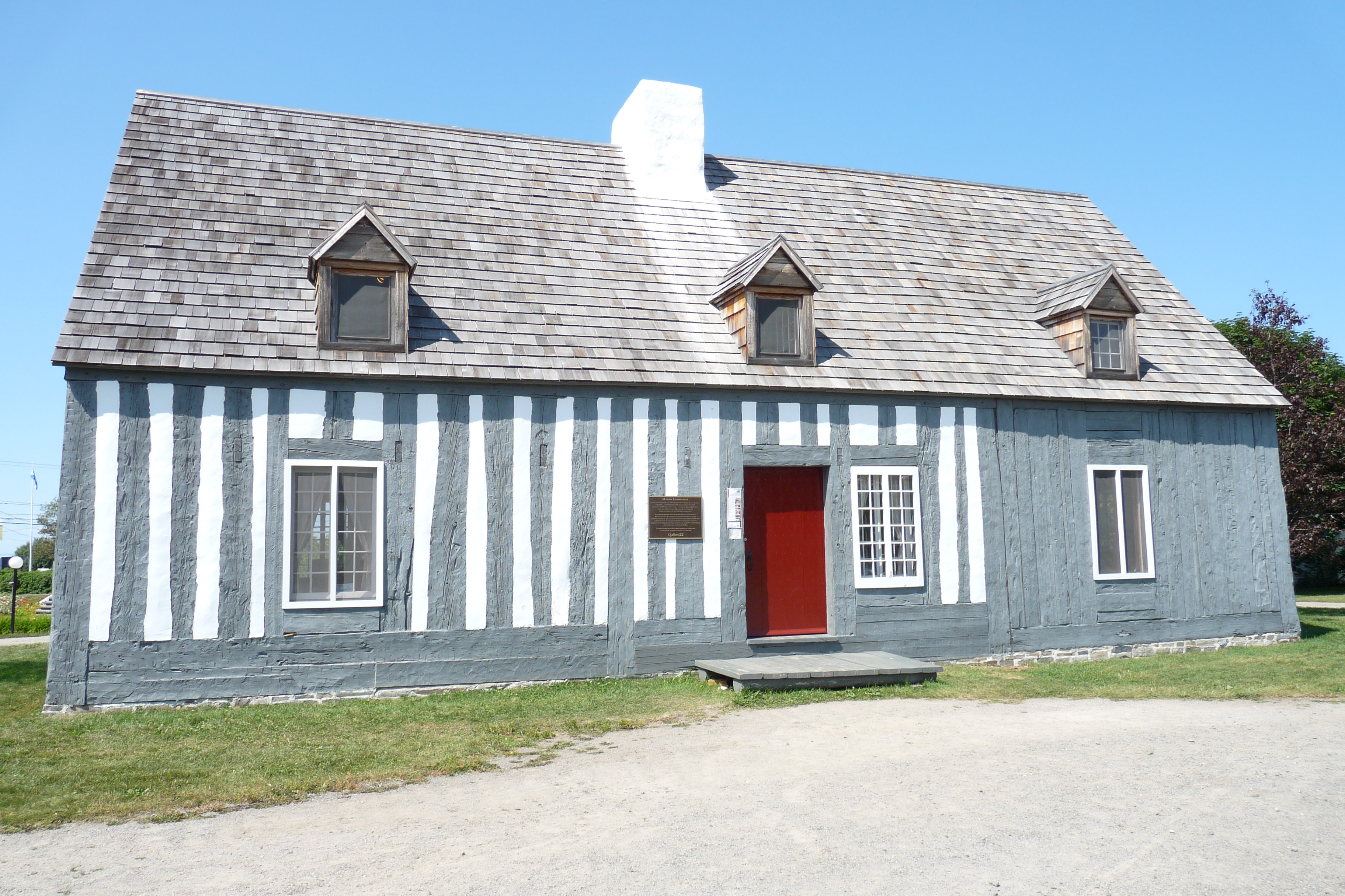 Maison Lamontagne de Rimouski en 2010